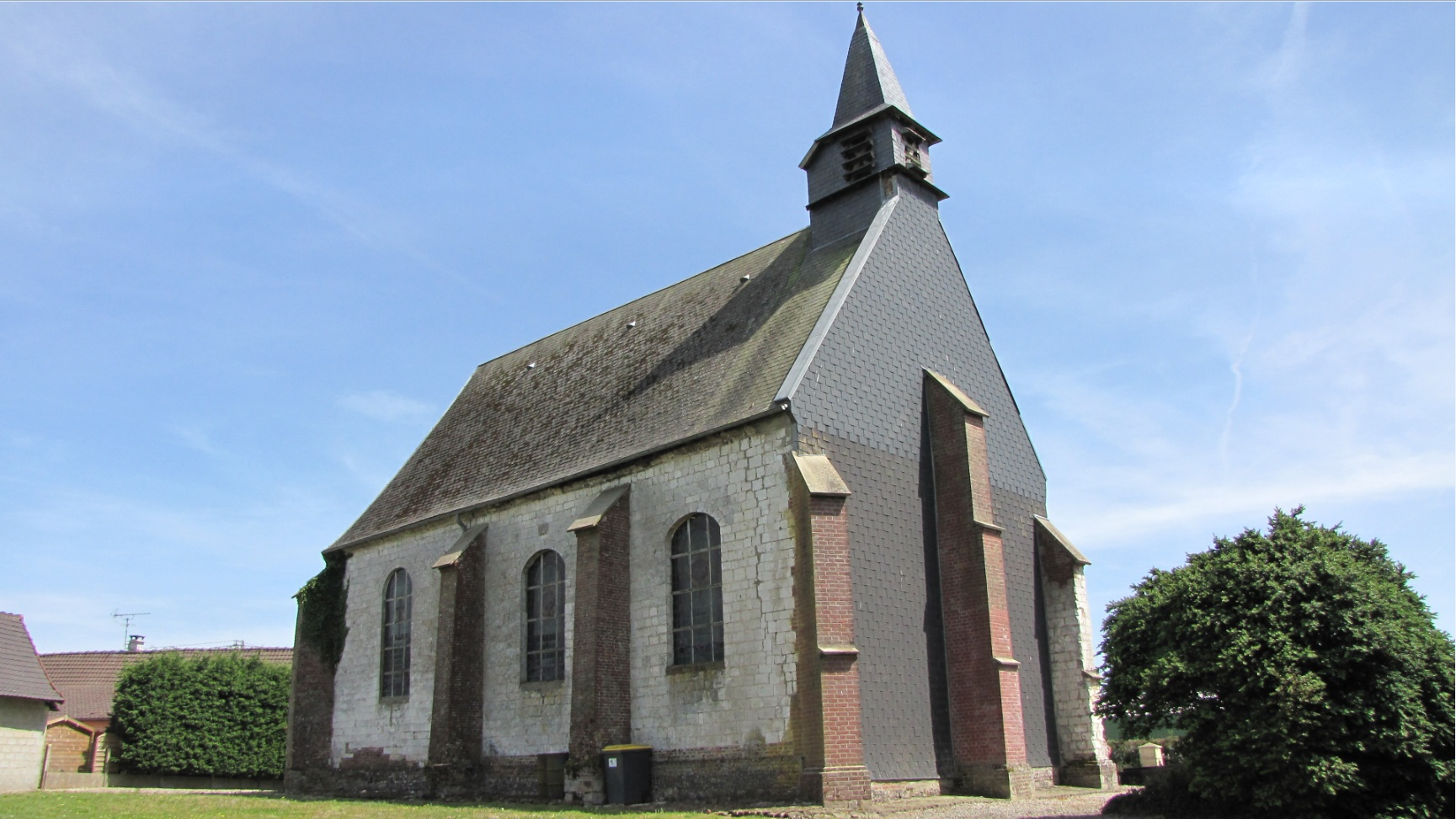 Vue générale de l'église d'Avondance, face Nord